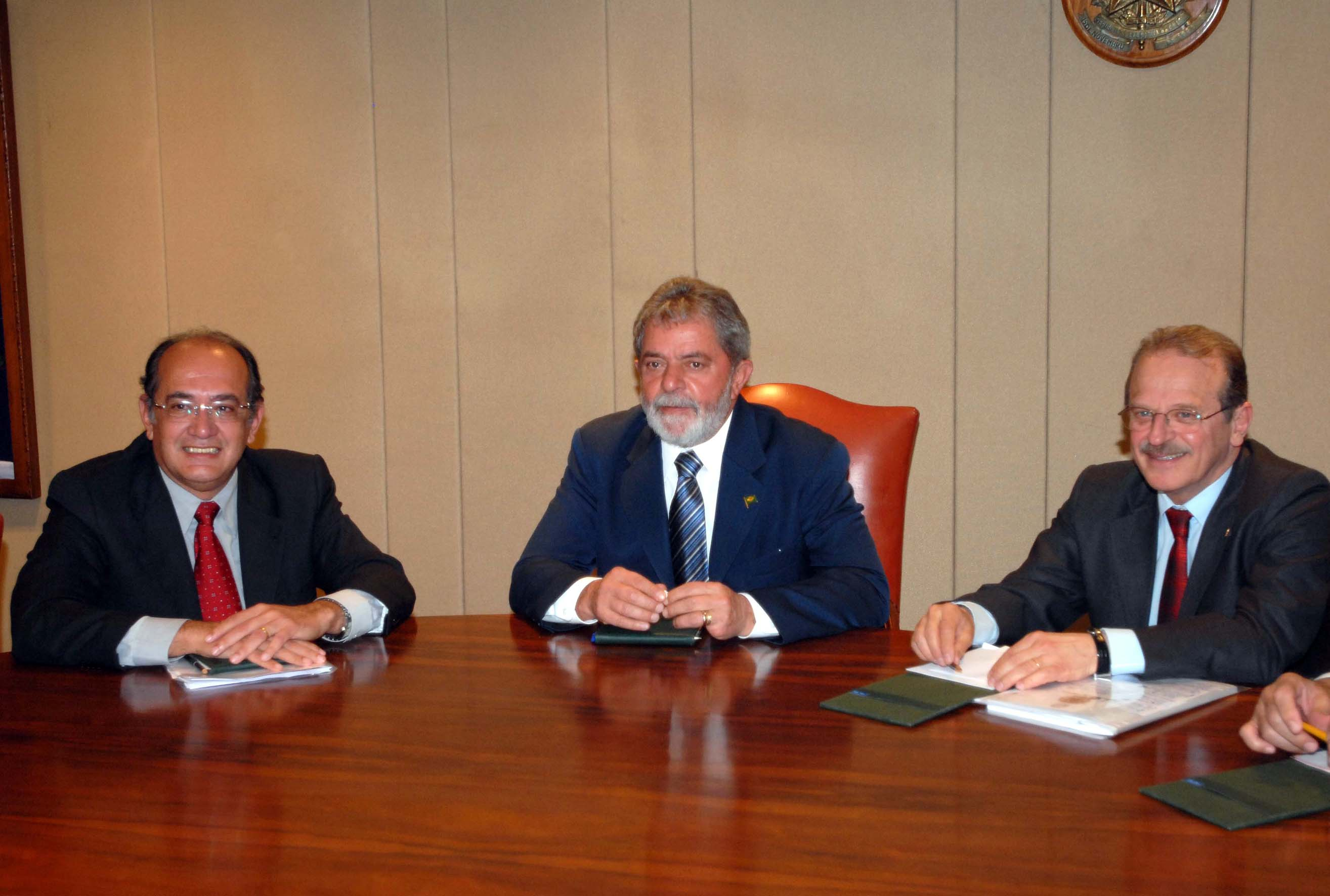 O presidente do Supremo Tribunal Federal (STF), ministro Gilmar Mendes, o presidente Lula e o ministro da Justiça, Tarso Genro, durante audiência no Palácio do Planalto